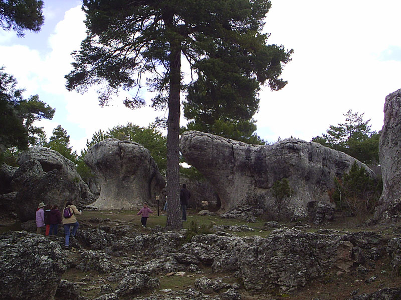 Una foto de los Callejones de Las Majadas